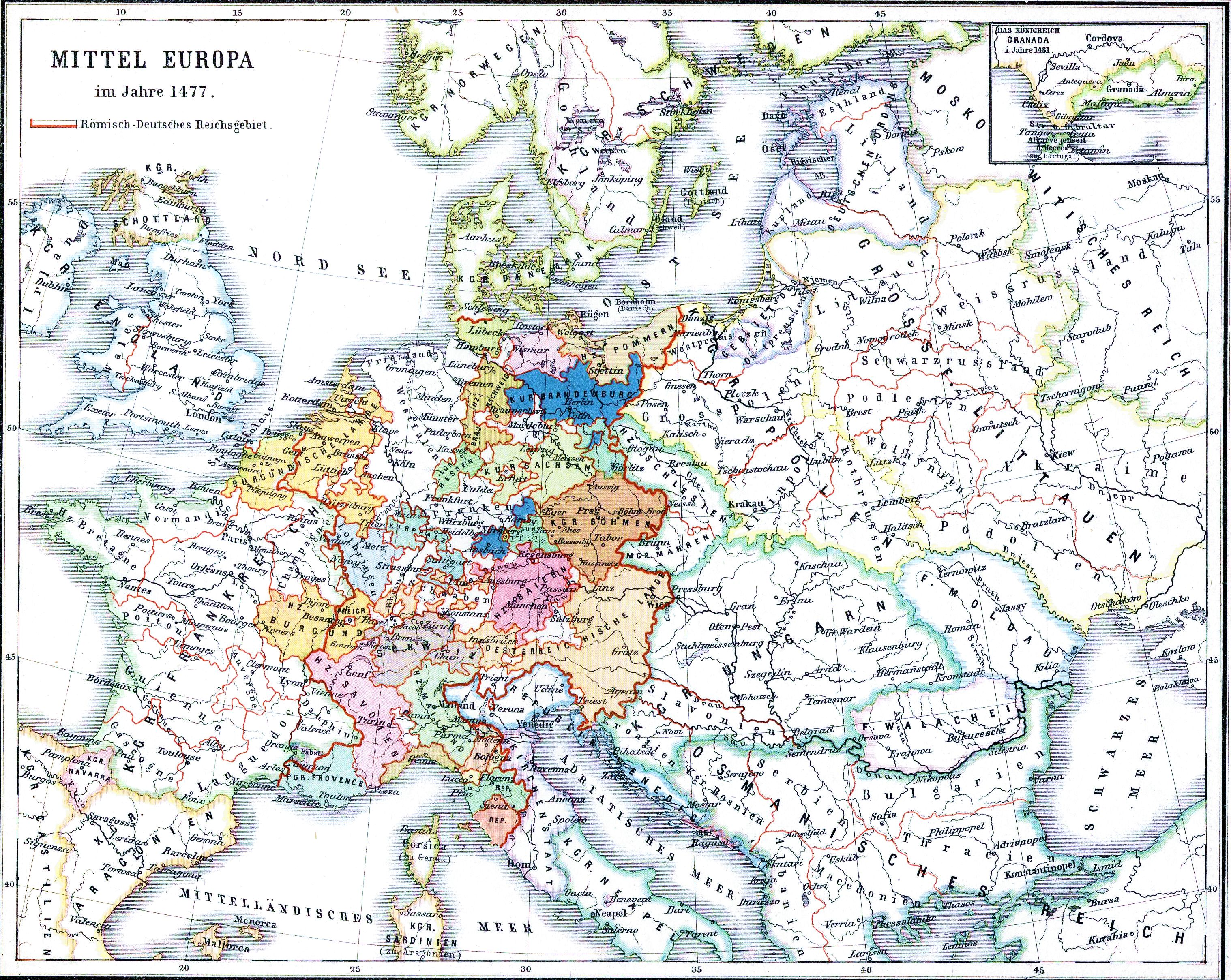 Mitteleuropa im Jahre 1477